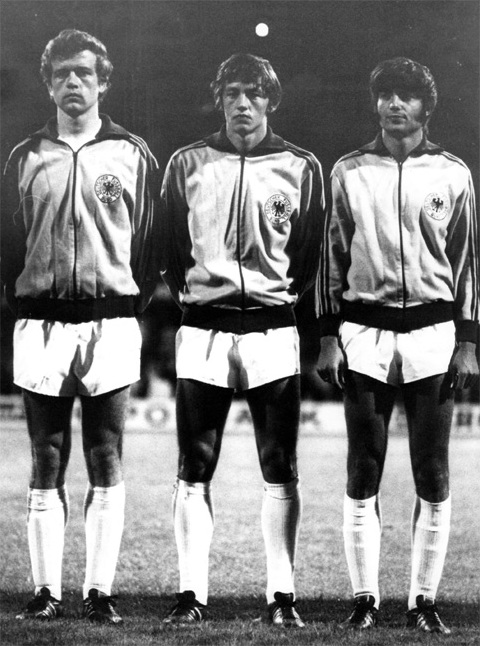 Friedhelm Haebermann, Edgar Schneider und Jürgen Kalb vor dem Amateur-Länderspiel am 7. September 1971 in München gegen Bulgarien